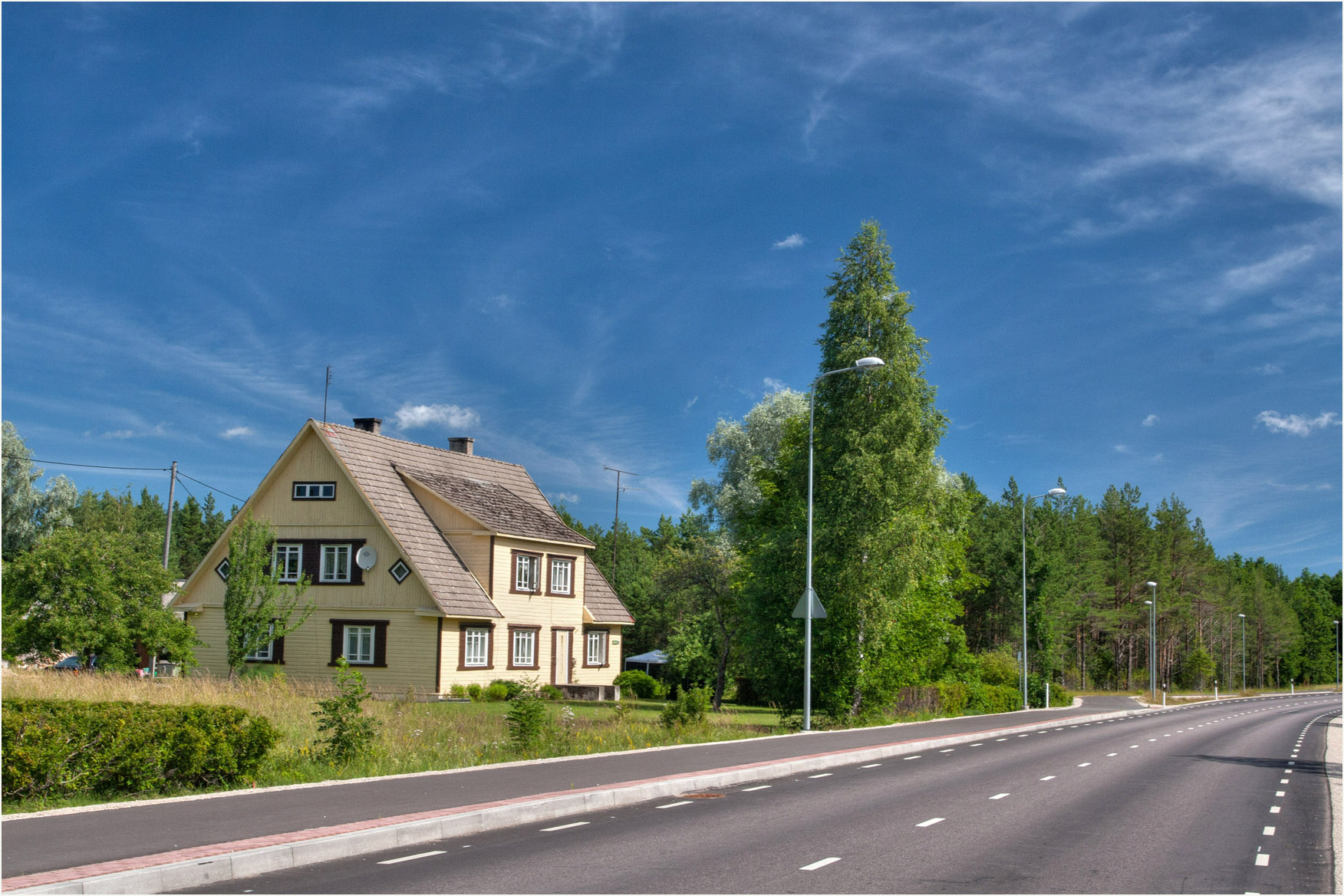 Kõrgessaare